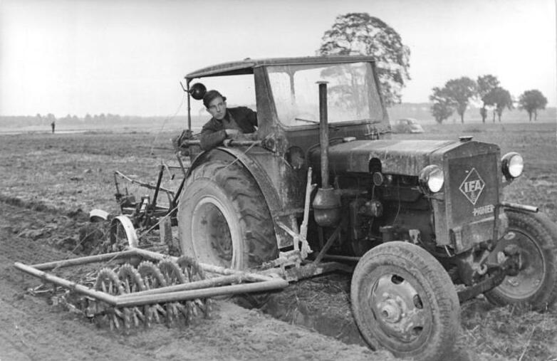 Pfaffendorf, Traktorist bei der Feldarbeit Zentralbild Quaschinsky No-Nlk 11.10.1952. Trakosist Emil Kurz erfüllte den Fünfjahrplan. Der 21jährige Traktorist Emil Kurz von der MAS Pfaffendorf im Kreise Beeskow erfüllte am 9.10.1952 den Fünfjahrplan. Emil Kurz gehört zu der besten Brigade der MAS, zur Brigade "Anton Ackermann". Durch unermütlichen und bis auf das kleinste vorbereiteten Einsatz hatt Kurz bis zum 30. September bereites 1194 Hektar mittleres Pflüren (davon 1034 Hektar Feldarbeit) geleistet. Das sind 275 Prozent seines Zweijahressolls. AM 13. Oktober 1952 wird Emil Kurz zum zweiten mal als Aktivist ausgezeichnet. Er hat mit seine Leistung geseigt, das die Jugendlichen in der Landwirtschaft in ihrem kämpferischen Geist ihren kollegenin der Industrie nicht nachstehen. UBz: Traktorist Kurz mit seinem IFA-Traktor "Pionier" bei der Feldarbeit. Information added by Wikimedia users.